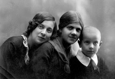 У. Караткевіч у дзяцінстве з маці Надзеяй Васілеўнай і сястрой Наталляй. Віцебская вобласць, г. Орша. 1937 г.